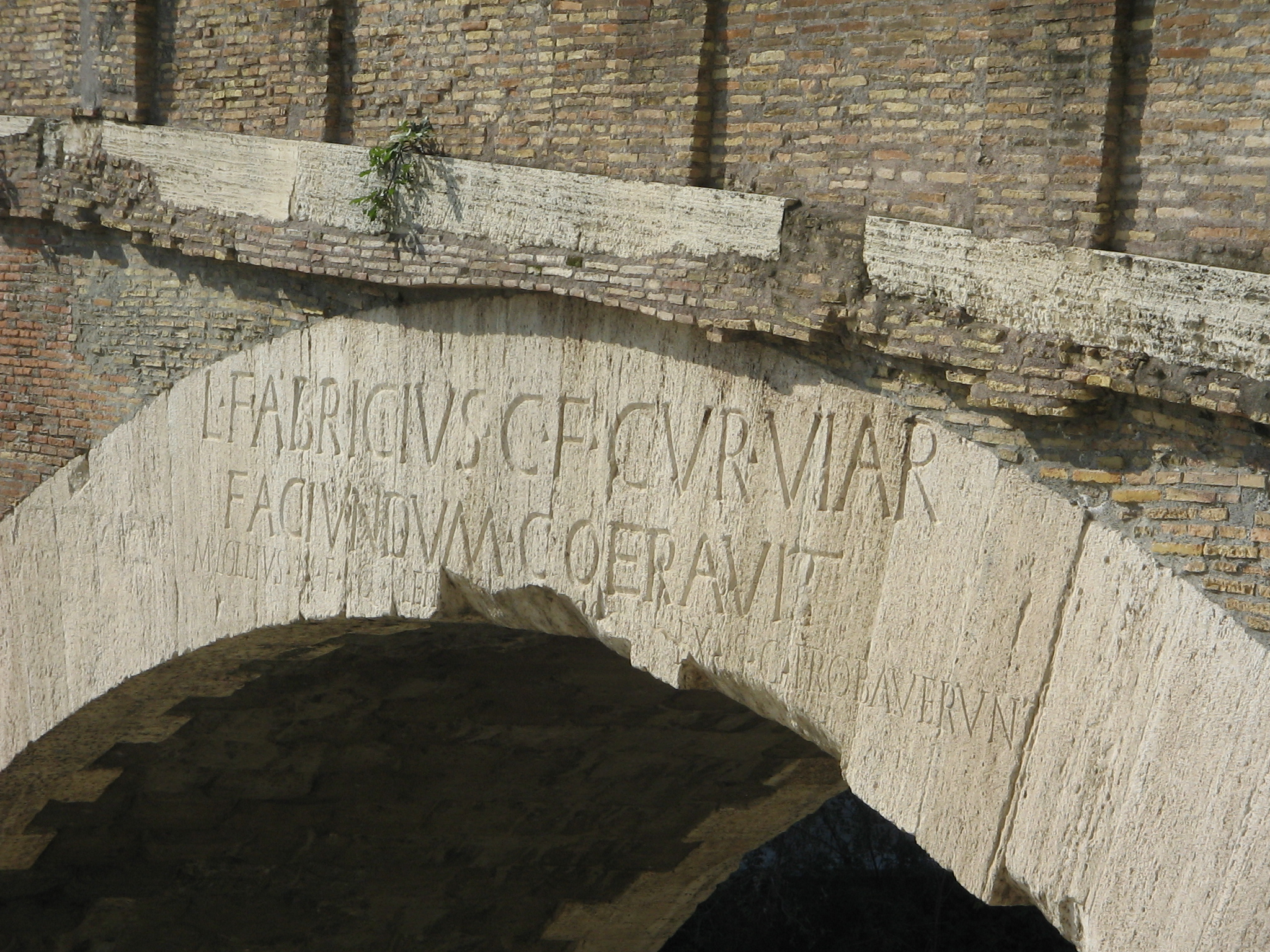 Ponte Fabricio aka Ponte Quattro Capi in Latino: L•FABRICIVS C•F•CVR•VIAR FACIVNDVM•COERAVIT